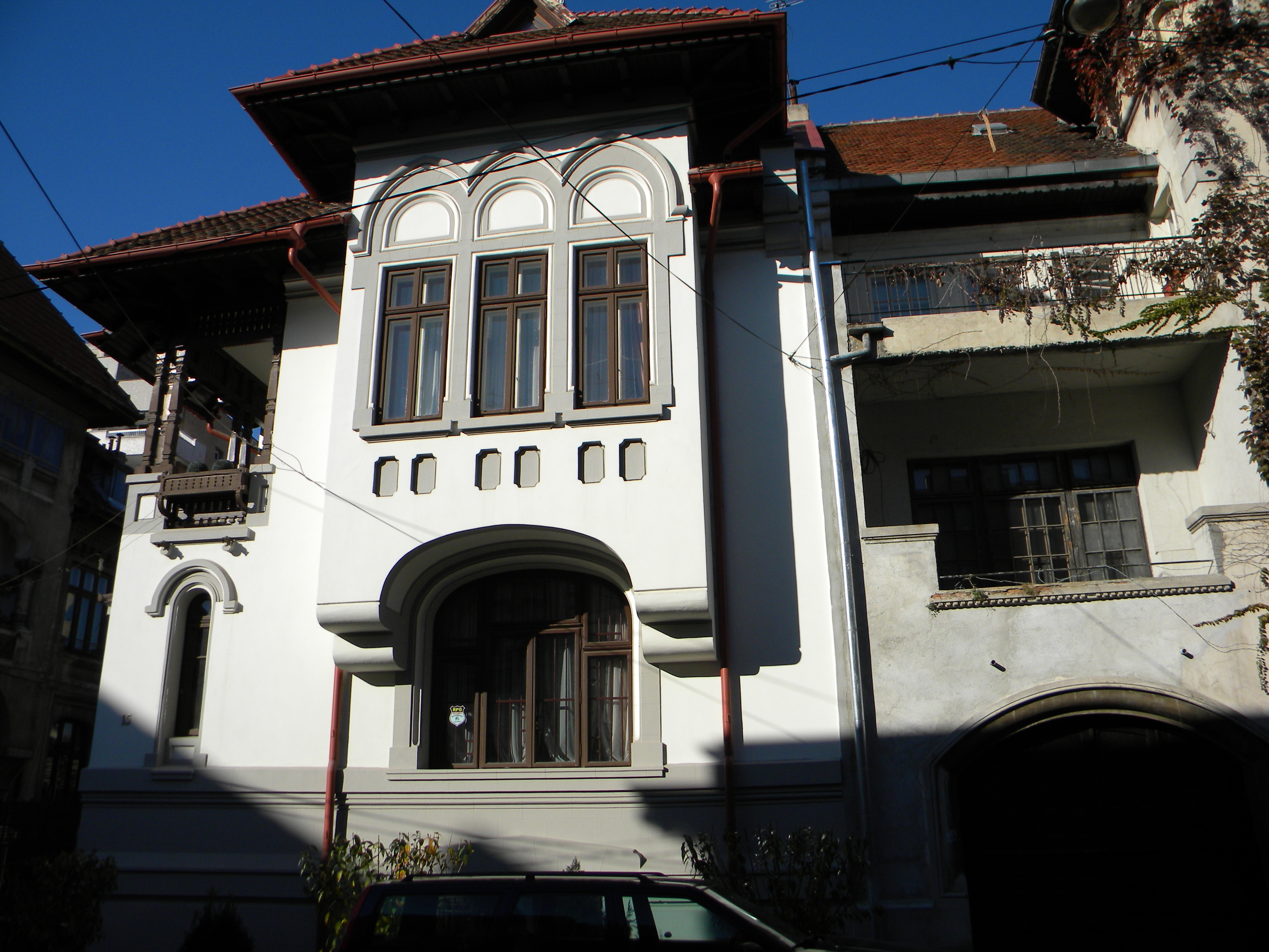 Bucuresti, Romania, Str. Alexandru Philippide, nr. 15, sect. 2 (Cod B-II-m-B-19384) (1 prim)